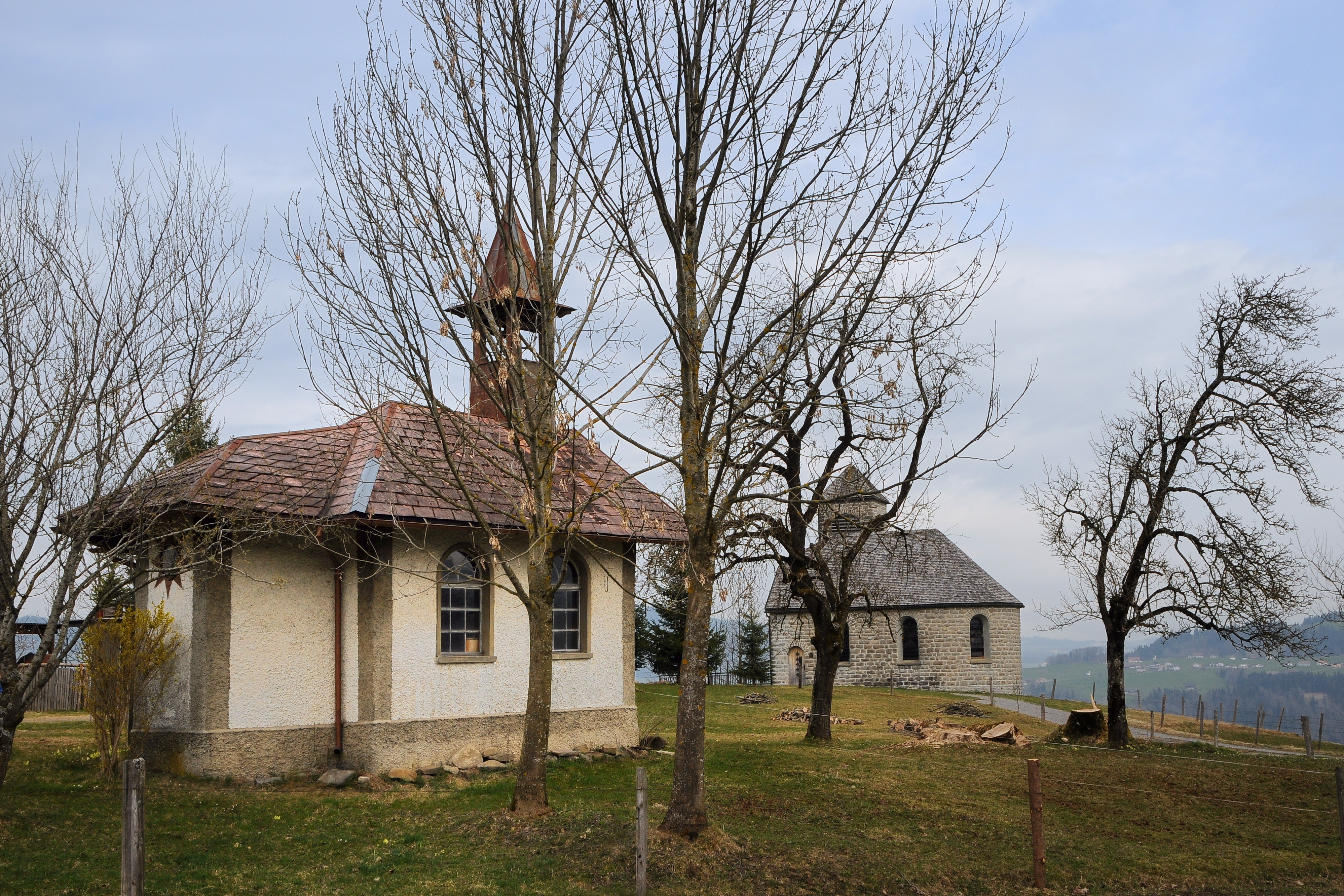 Fatima-Kapelle und Marienkapelle in Vorholz (Alberschwende.